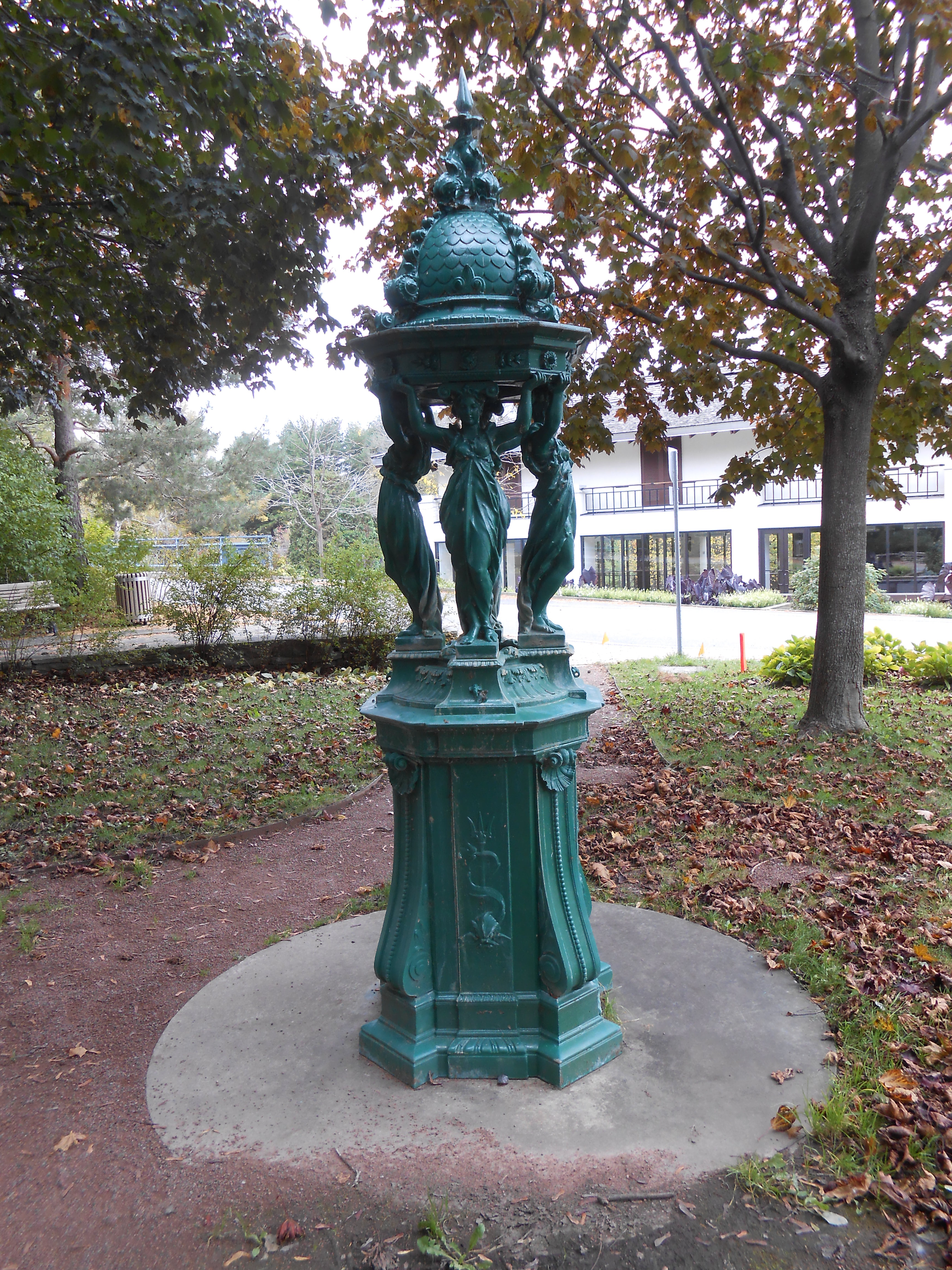 Fontaine Wallace, Jardins des Floralies, île Notre-Dame, Montréal